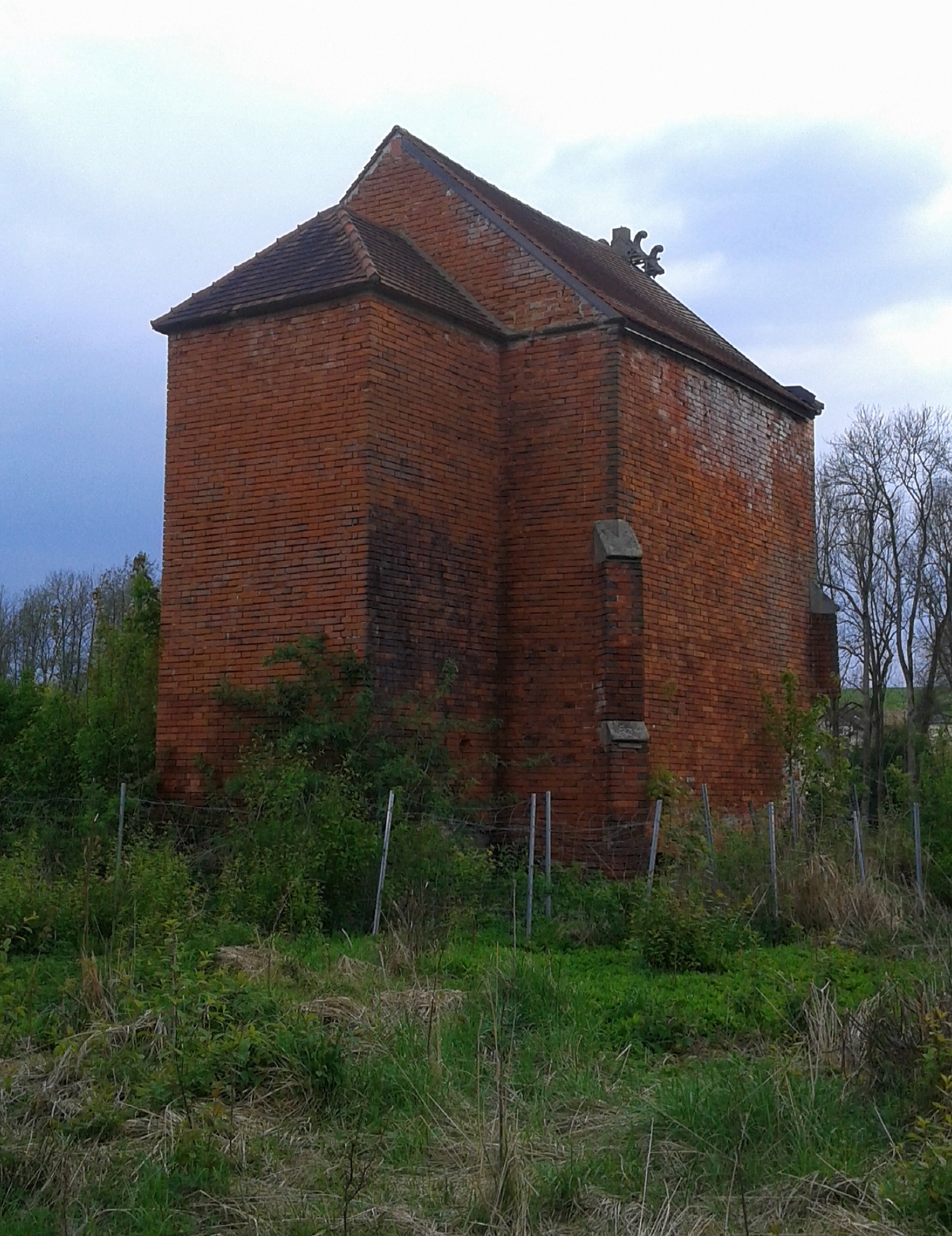 ehemalige Gruftkapelle der Grafen Tauffkirchen-Kleeberg in Trostling bei Ruhsdorf an der Rott, Niederbayern